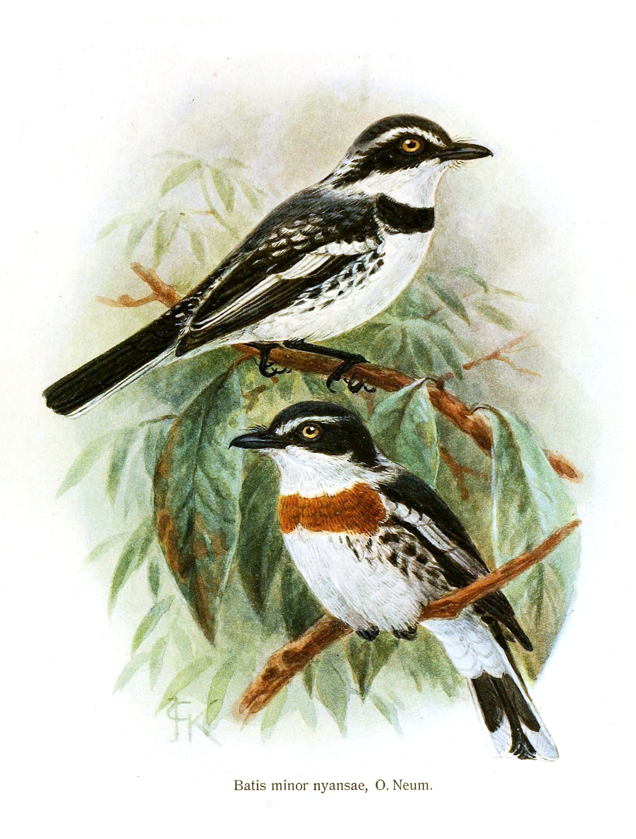 Batis minor nyansae